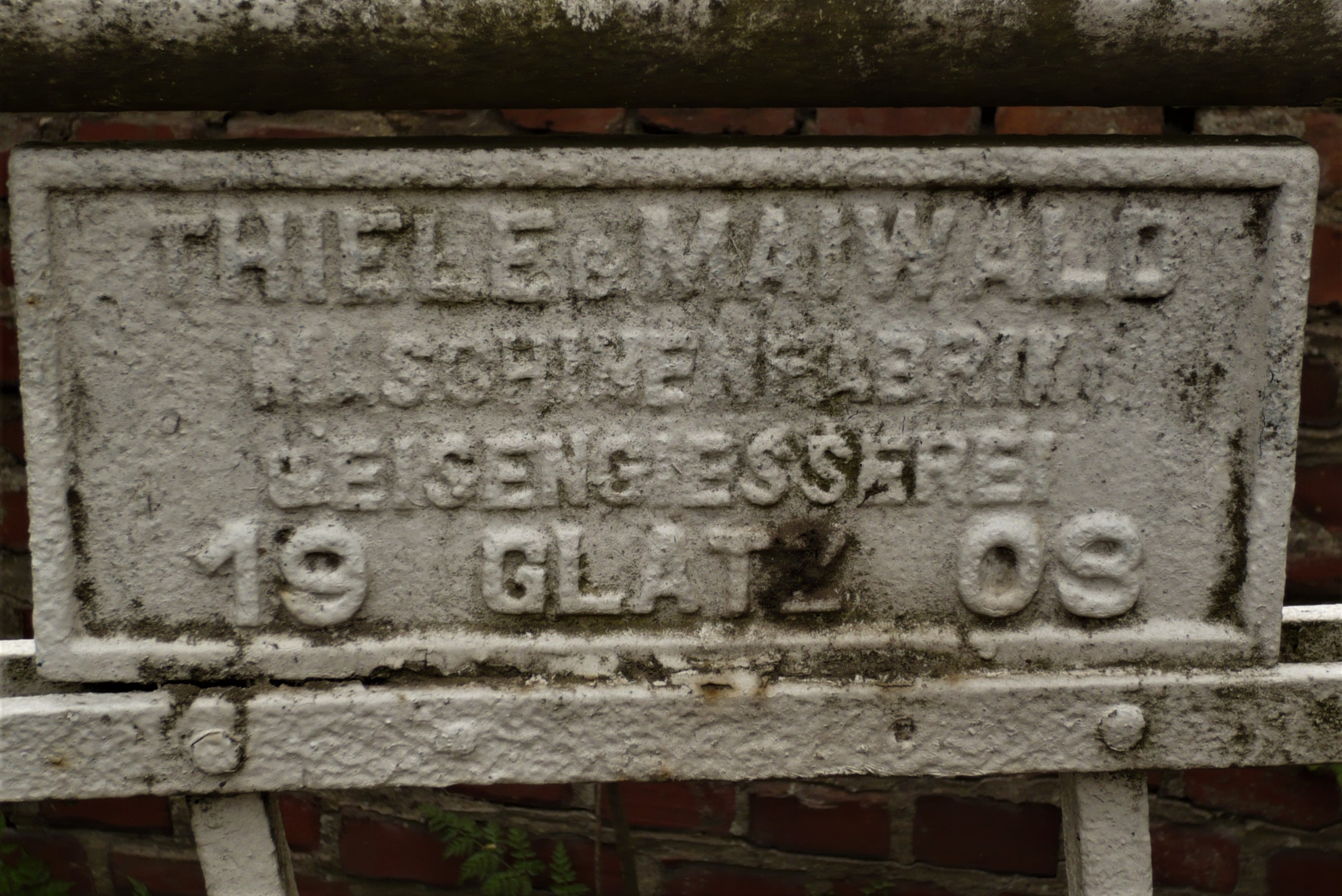 Piszkowice. Tabliczka na moście przy młynie